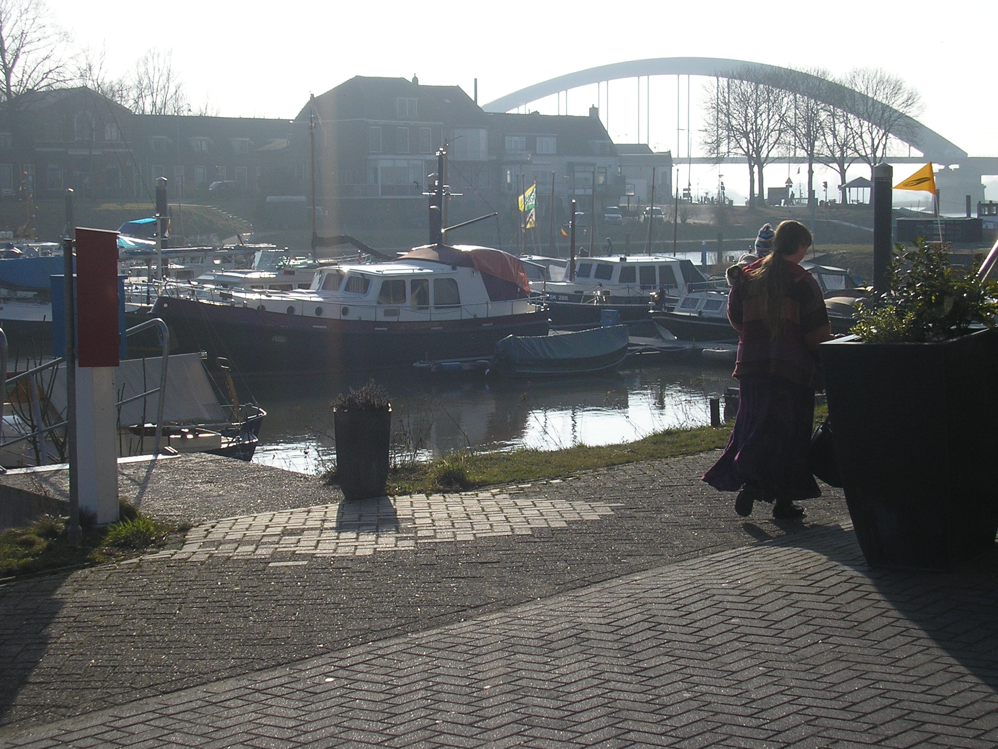 Spoorbrug en zicht op de haven bij Culemborg